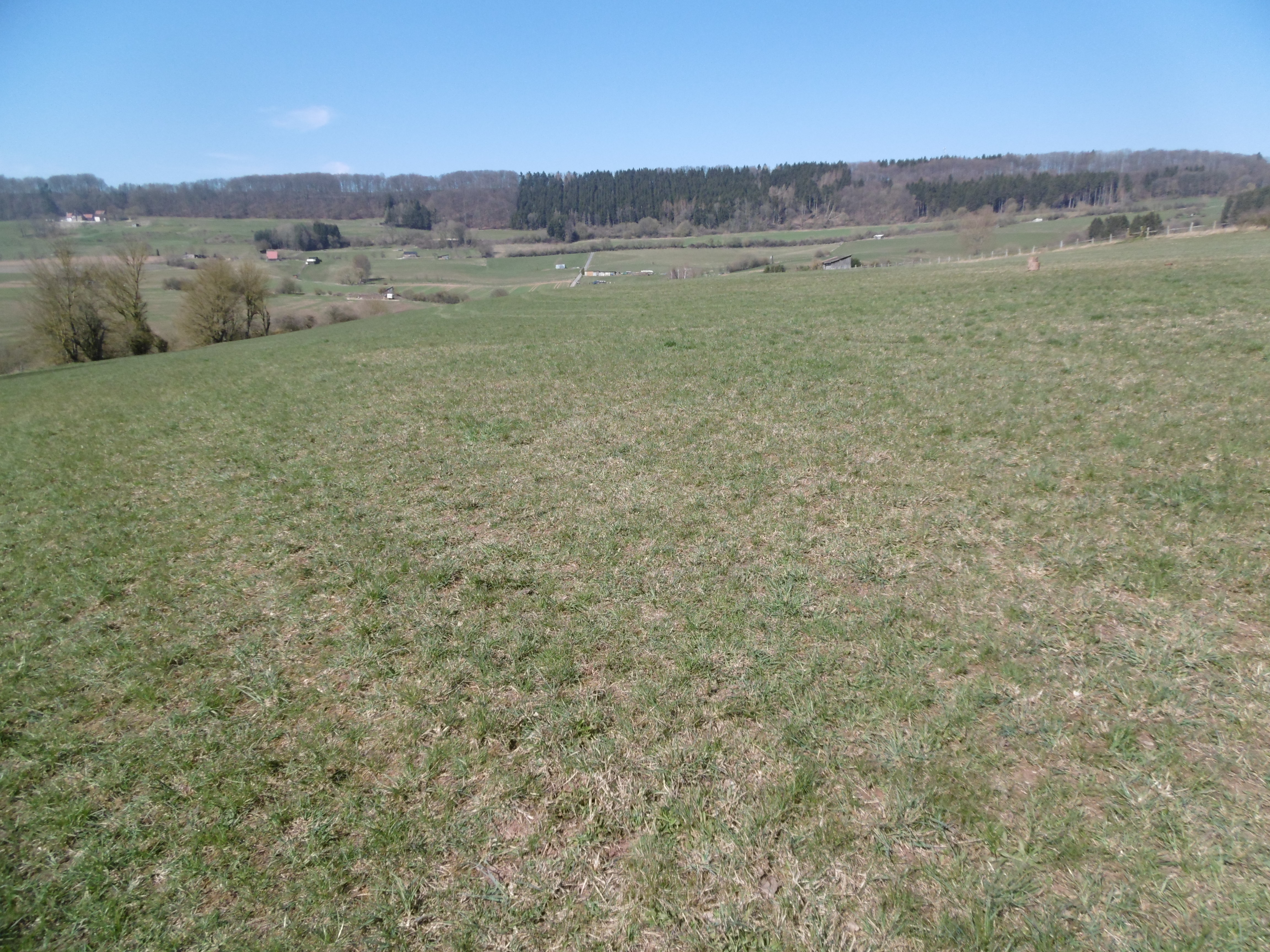 Landschaftsschutzgebiet Vor der Egge aufgenommen aus LSG nahe der Ostseite vom Naturschutzgebiet Dahlsberg; Bäume links gehören noch zum NSG.